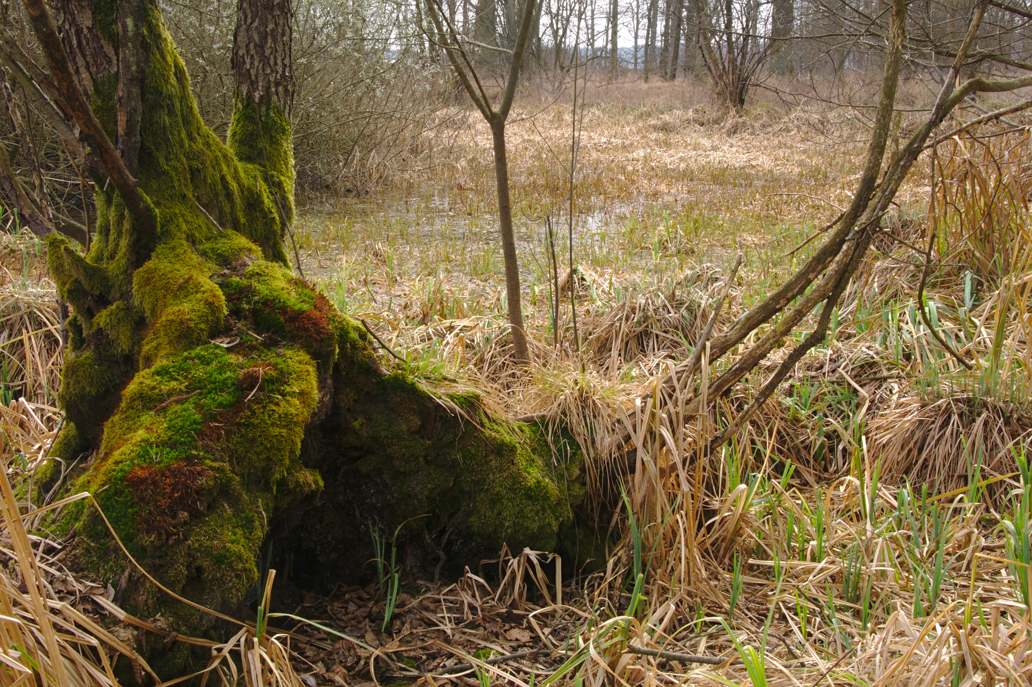 Přírodní památka V Boukalovém, okres Olomouc